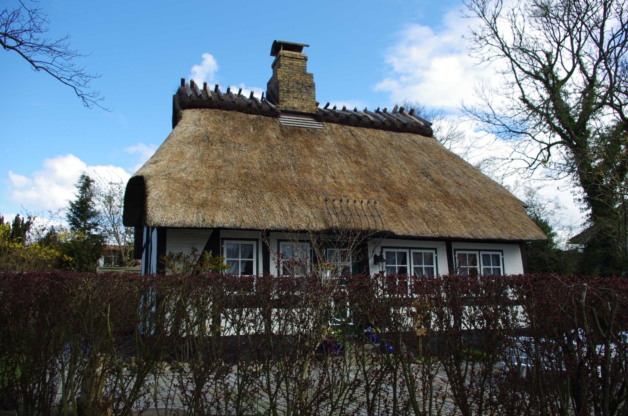 Kappeln in Schleswig-Holstein. Die ehemalige Kate Boysen steht unter Denkmalschutz. Sie befindet sich in der Straße Fischergang 2 in Ellenberg in der Nähe der Schlei.